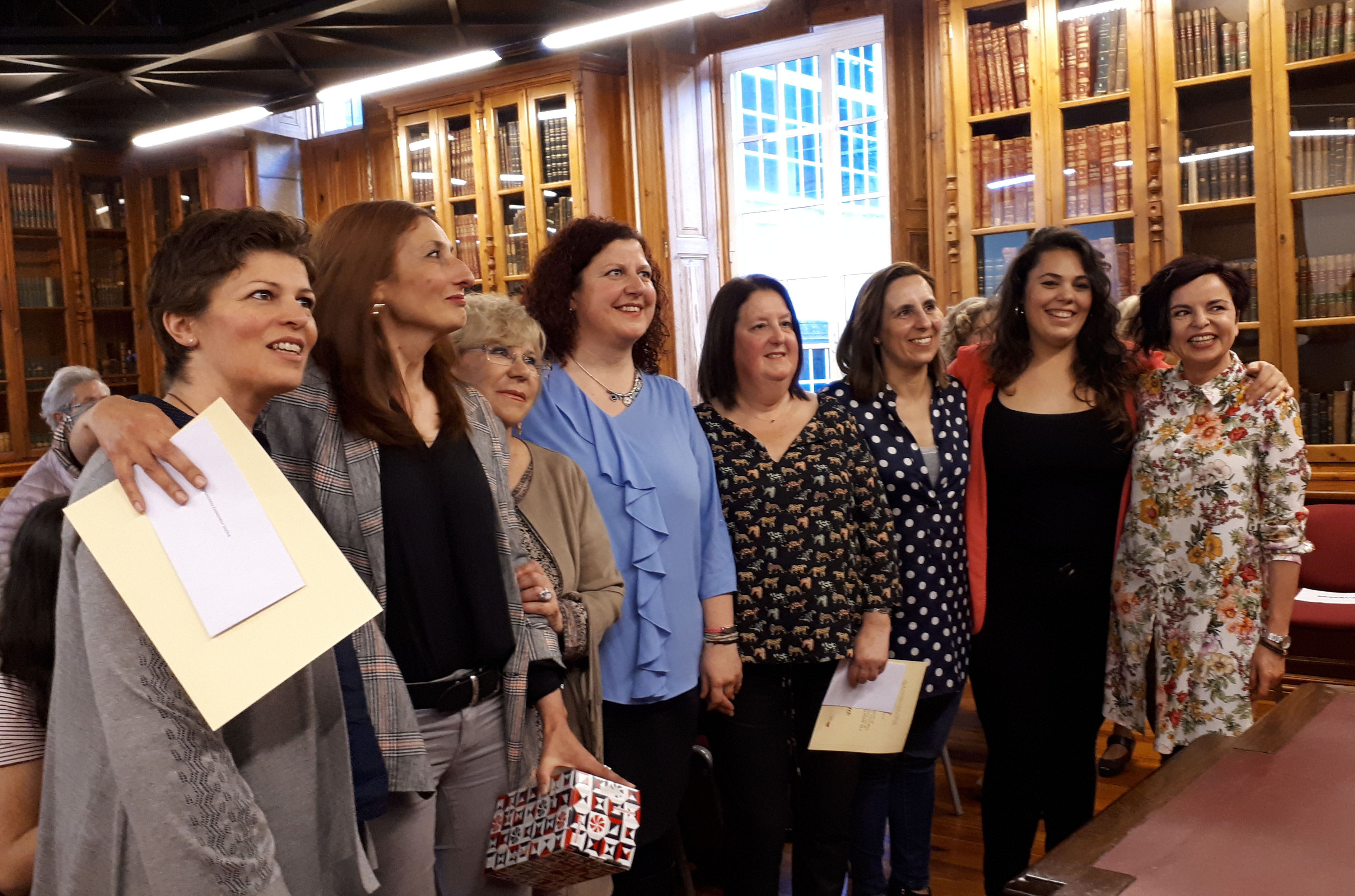 Ganadoras y Directiva del VII Certamen de microrrelatos mujeres Progresistas. Esther Alonso Domínguez, Raquel Fernandez Fernandez, Scheila Patricia, Andrea Costas Otero